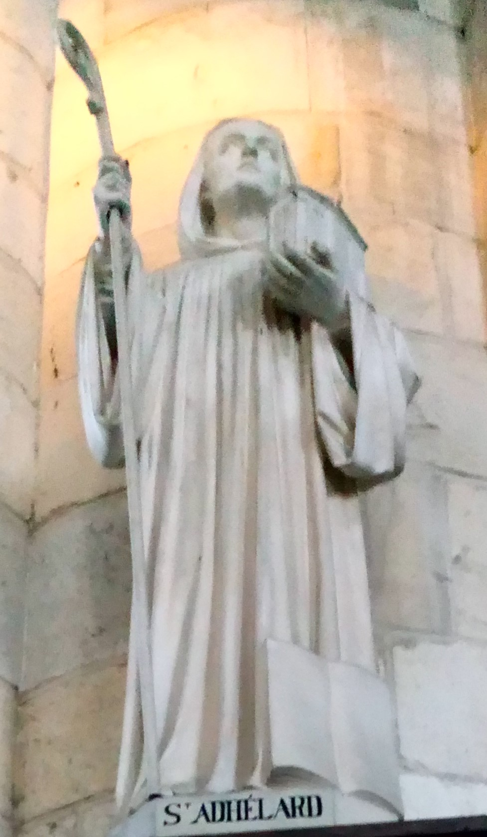 Abbatiale Saint-Pierre de Corbie, intérieur, Adhélard 1